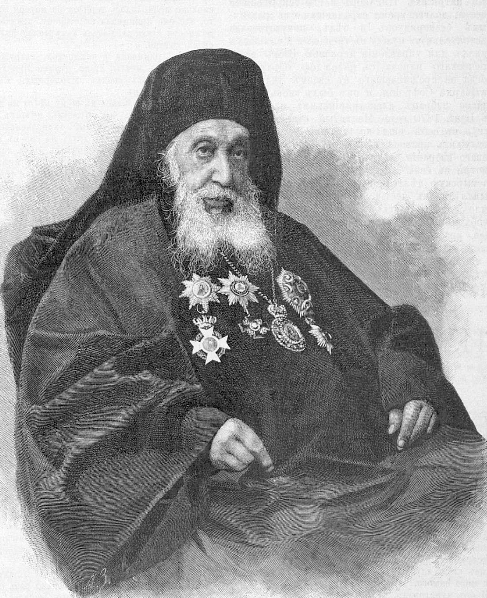 Софроний IV (Патриарх Александрийский)